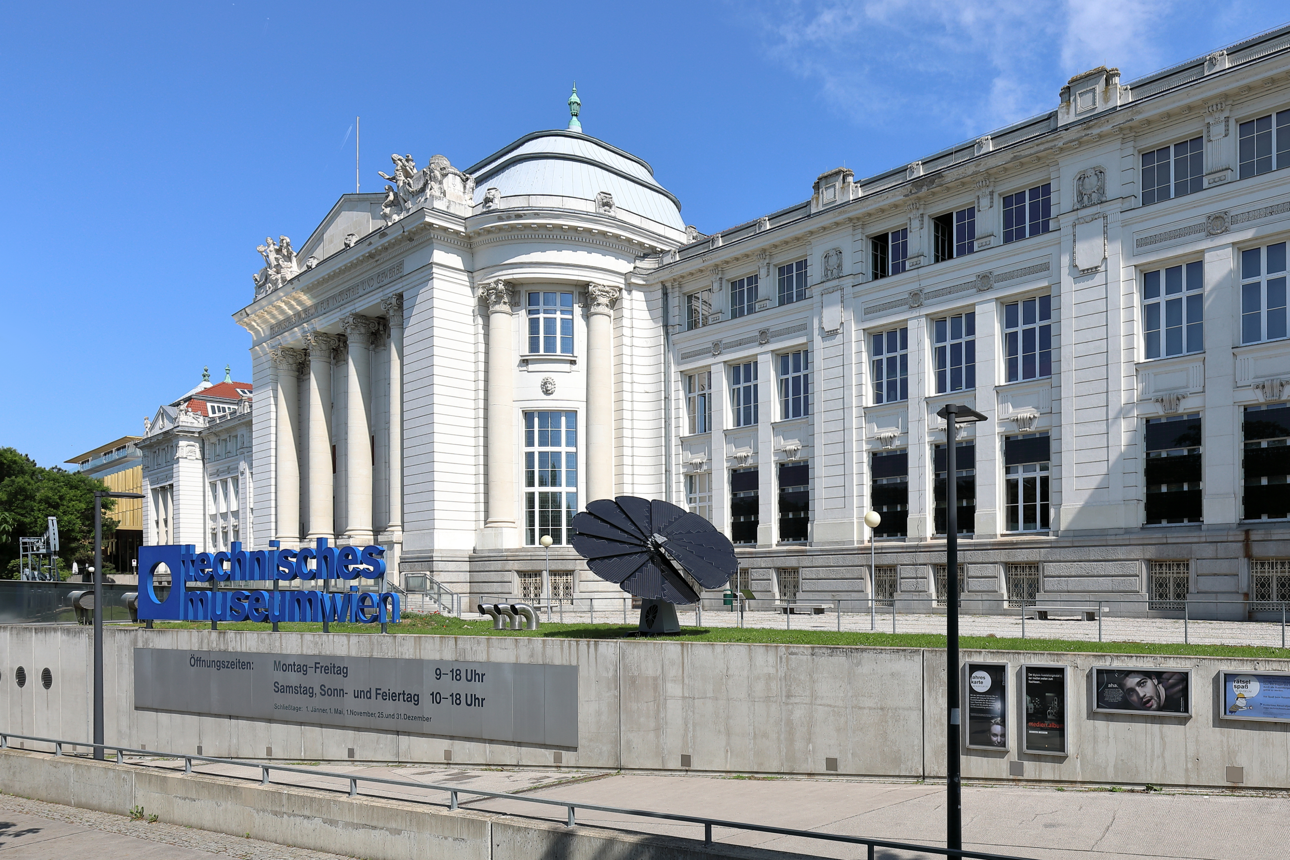 Die Hauptfassade des Technischen Museums an der Adresse Mariahilfer Straße 212 im 14. Wiener Gemeindebezirk Penzing.Das Gebäude wurde ab 1909 nach Plänen des Baurats Hans Schneider errichtet und am 6. Mai 1918 als „Technisches Museum für Industrie und Gewerbe“ eröffnet. 1992 wurde es zwecks Sanierung, Umbau und Vergrößerung geschlossen und am 17. Juni 1999 wieder eröffnet.